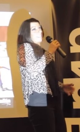 La patinadora y leyenda del deporte aragonés; Sheila Herrero en una conferencia en el año 2016 en su ciudad natal.